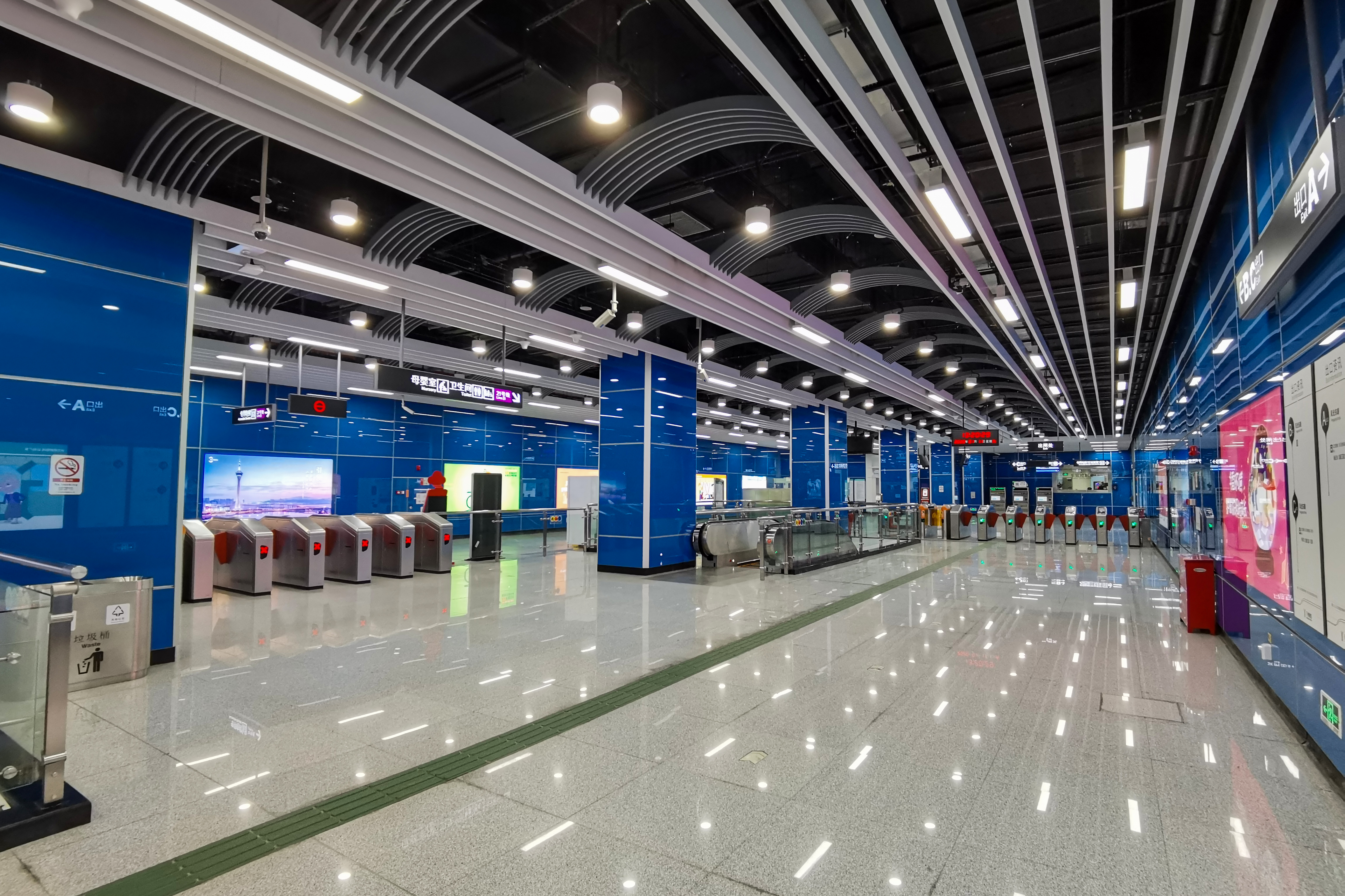 广州地铁坑贝站